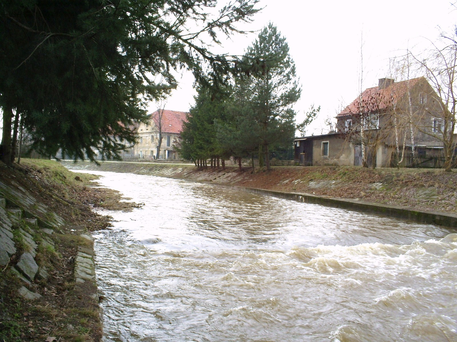 Nysa w północnej części wsi Roztoka